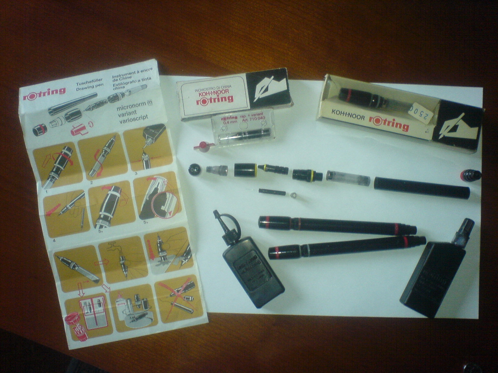 Penne Rotring per il disegno tecnico risalenti (presumibilmente) agli anni ottanta (v.).